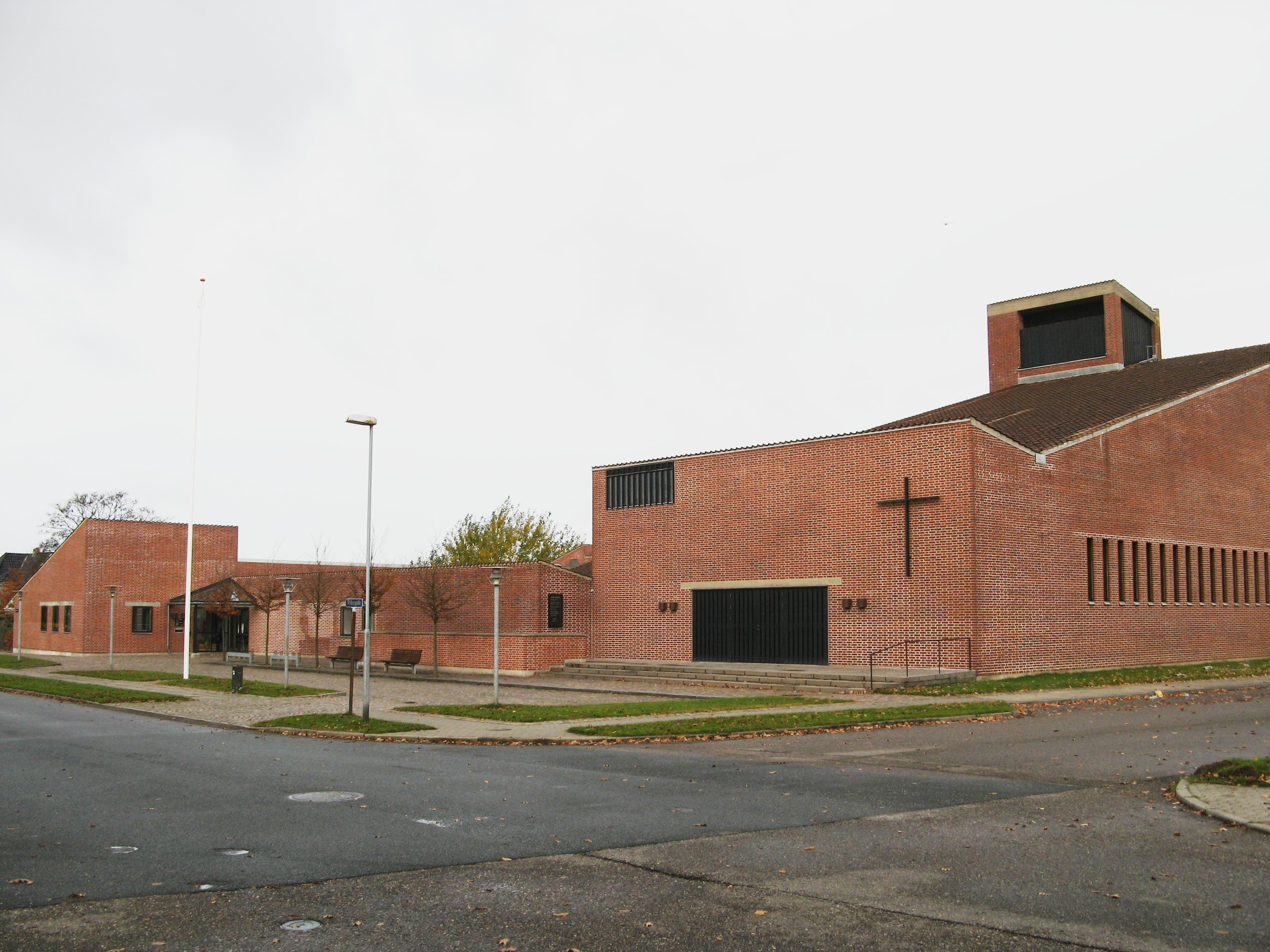 Grundtvigskirken, Grundtvigs sogn, Esbjerg kommune (former: Skads Herred, Ribe Amt). Kirken set fra sydøst